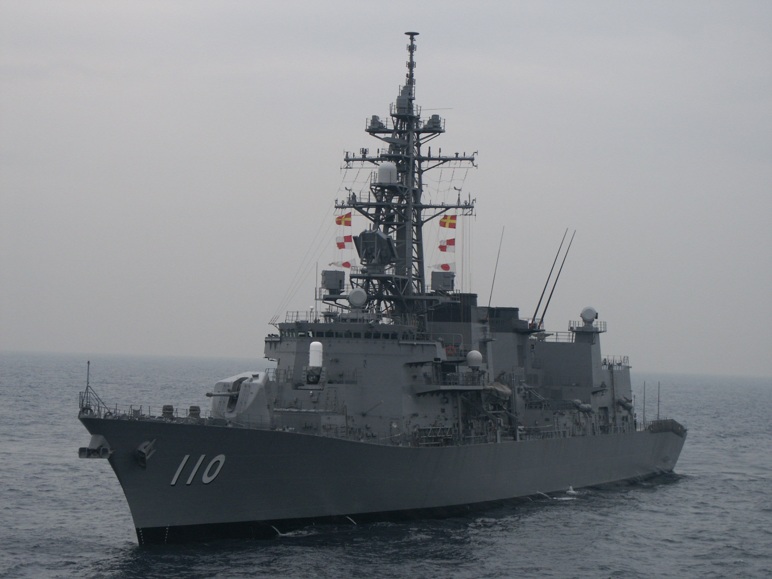 護衛艦「たかなみ」